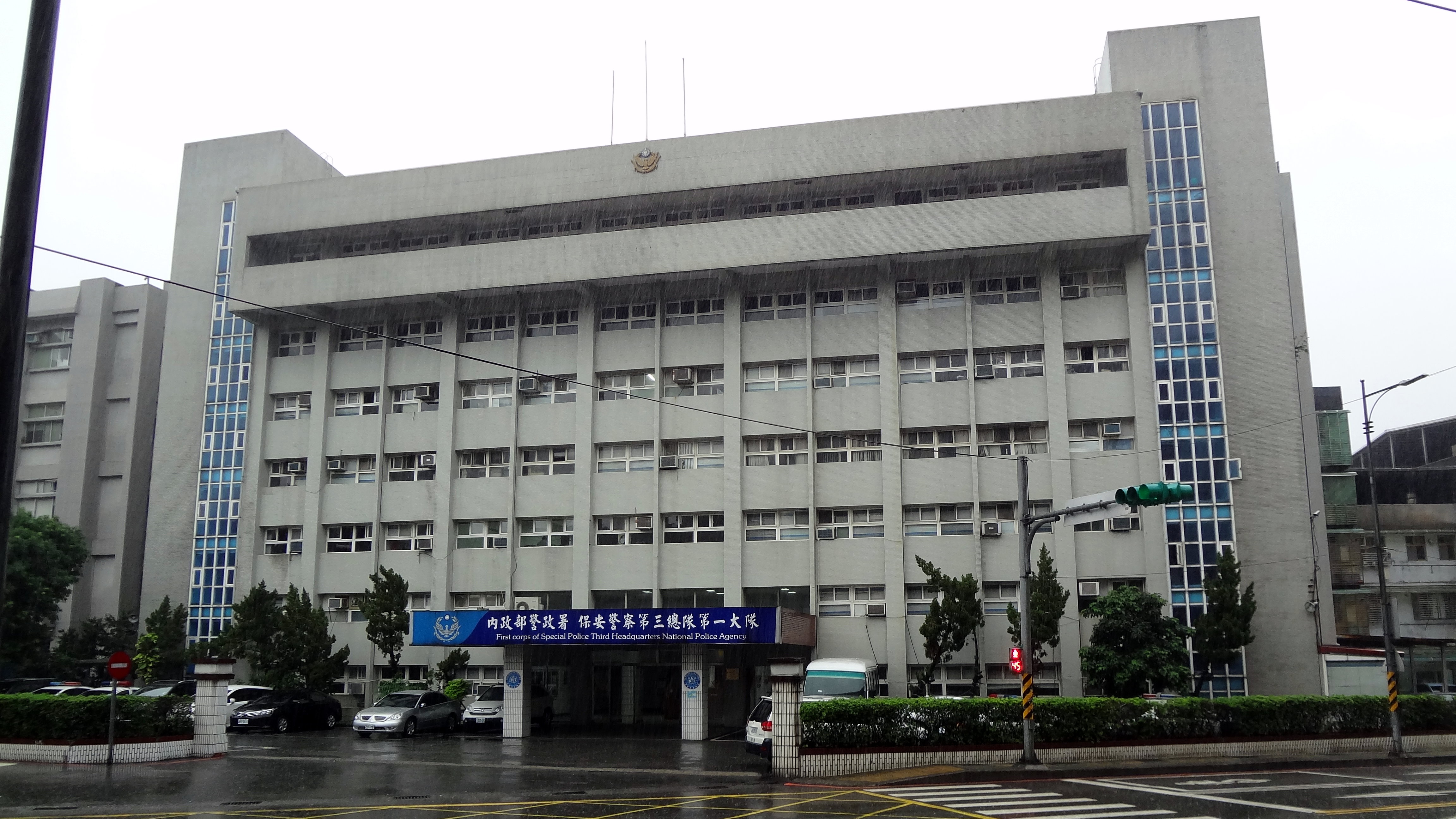 中文（台灣）: 雨中的中華民國內政部警政署保安警察第三總隊第一大隊辦公大樓，位於基隆市七堵區南光街23號。